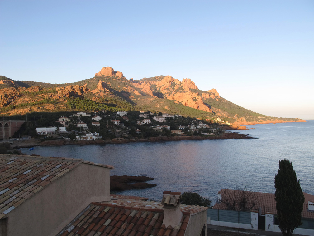 Pointe du Petit Caneiret et Pic du Cap Roux dans le Massif de l’Esterel. Vue d'Anthéor, PACA, France.